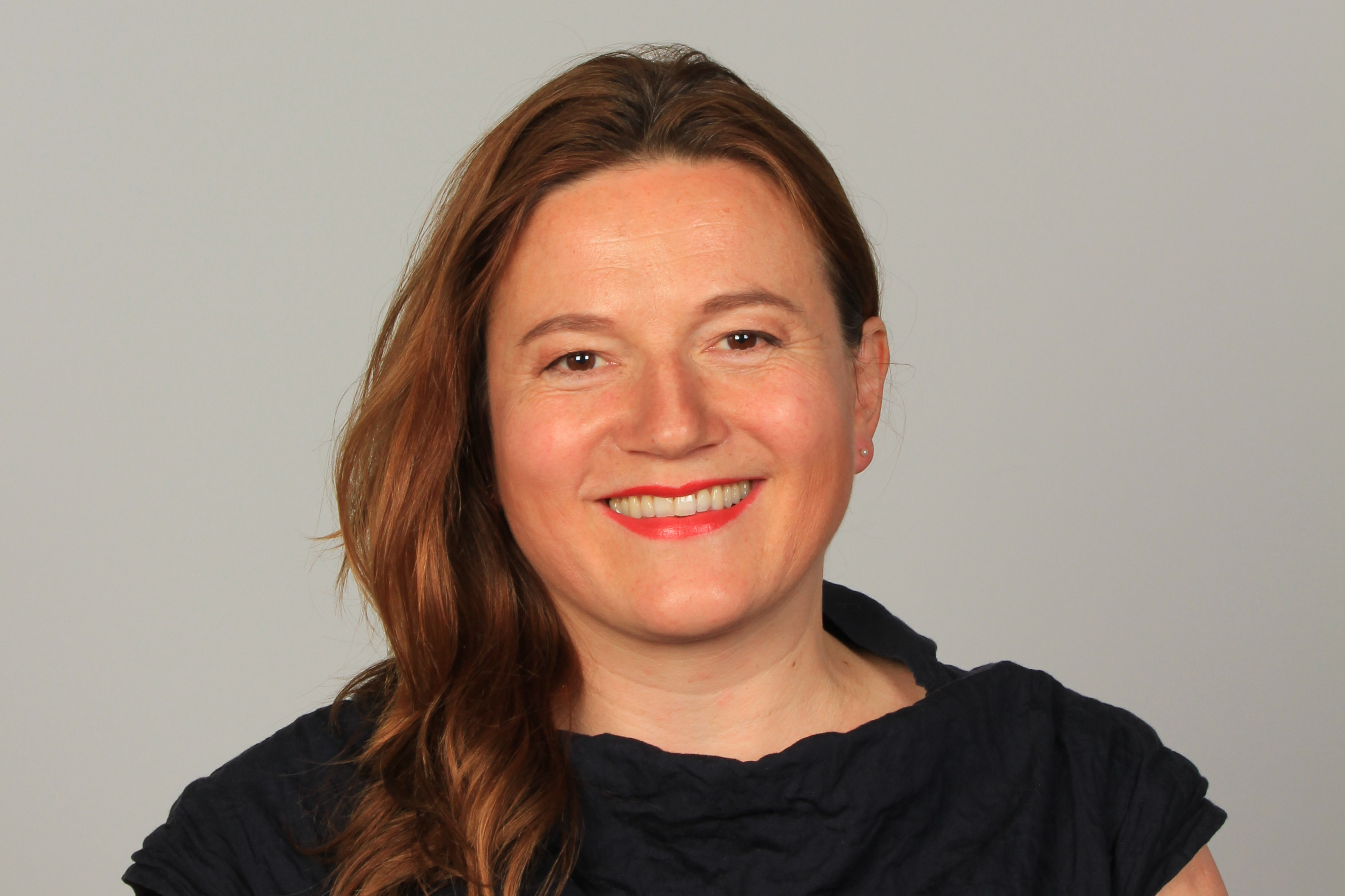 Fotoprojekt Österreichischer Film 2016:Schauspielerin Gisela Salcher